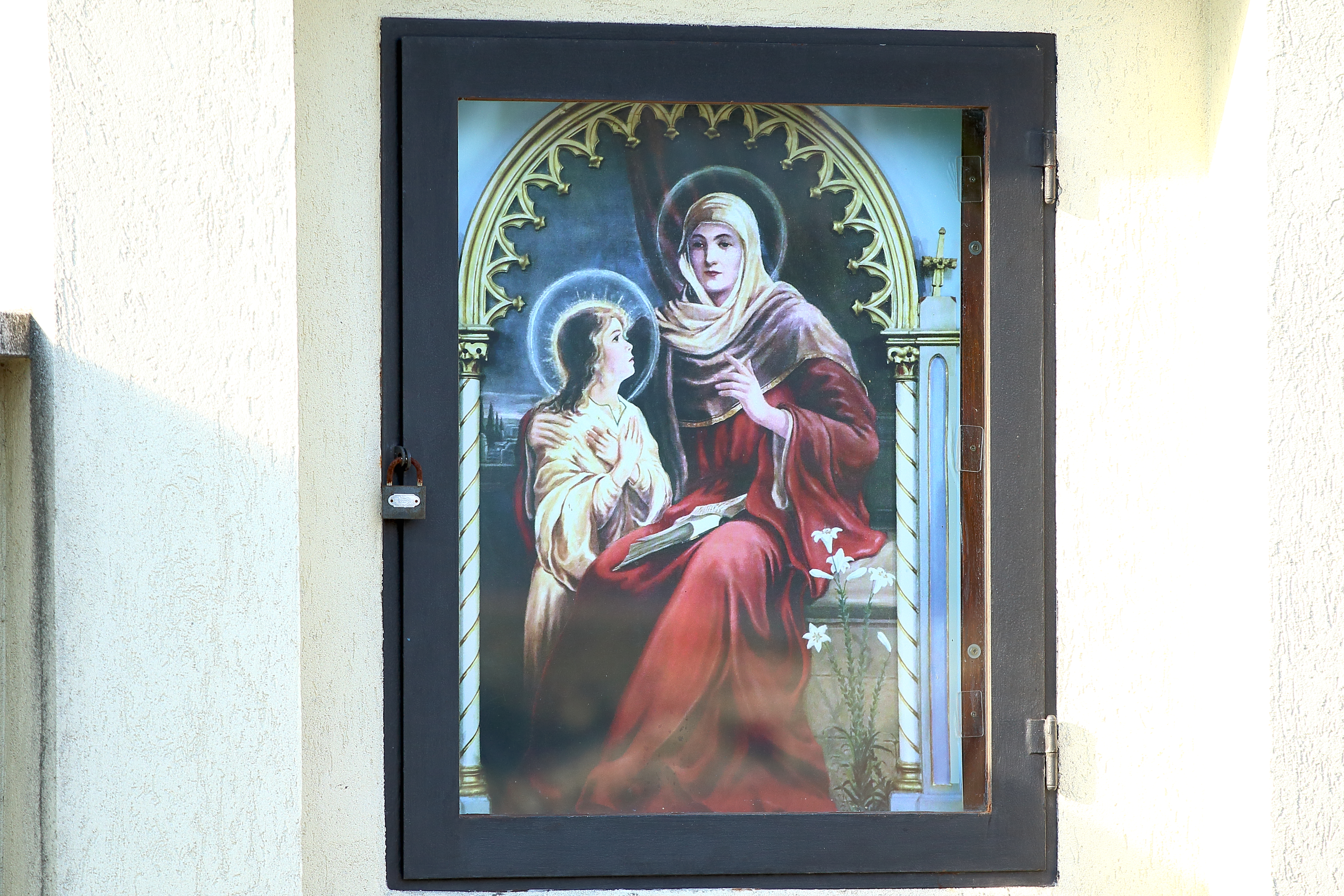 Árpádföldi Szent Anna kegyhely oltárképe